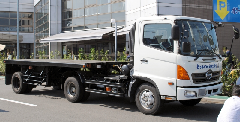 牽引免許用教習車。